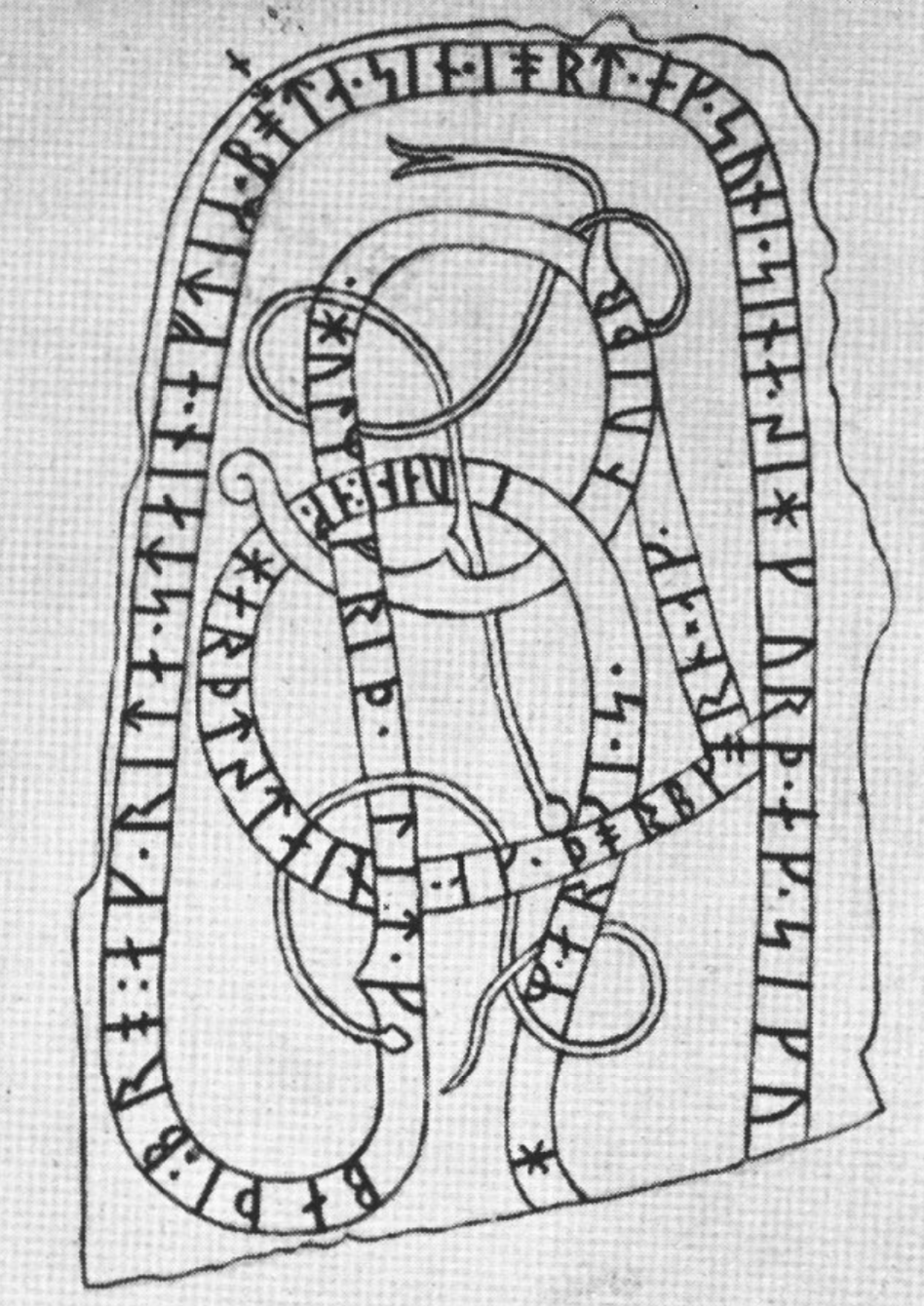 U 854. Prästgården, Balingsta sn. Efter teckning av Rhezelius